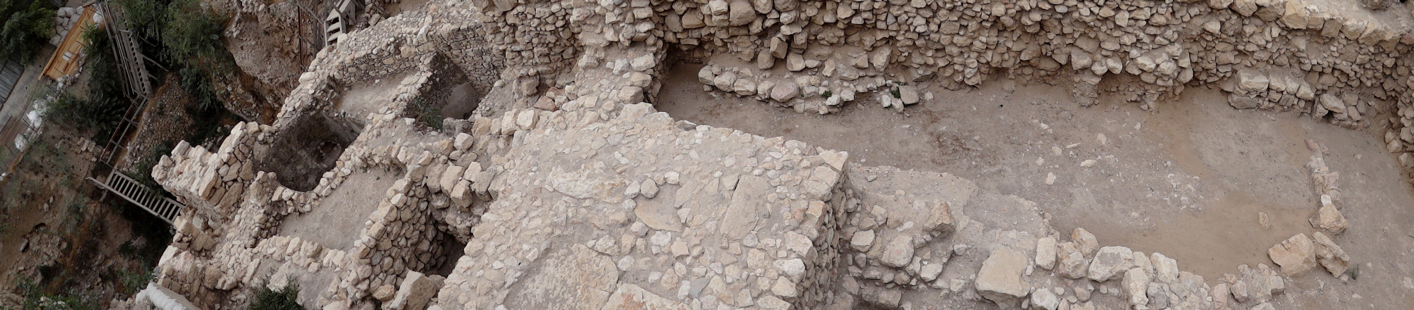 Excavation in City of David Givaty parking lot Jerusalem, Israe, status on October 12, 2011 חניון גבעתי בעיר דוד הינו חלק מהאתר הארכאולוגי עיר דוד. החפירות באתר זה החלו בחודש מרץ 2007. זו אחת מהחפירות הארכאולוגיות החשובות הנעשות בתחום עיר דוד שבשכונת סילואן בירושלים. הארכאולוגים האחראים הם דורון בן עמי ויאנה צ'חנוביץ תמונות שצולמו ב- 12 באוקטובר 2011 החלק המערבי של הוילה הגדולה שנחרבה בשנת 70, מימין החצר, במרכז בור מים, משמאל המקוואות וקירות המבנה